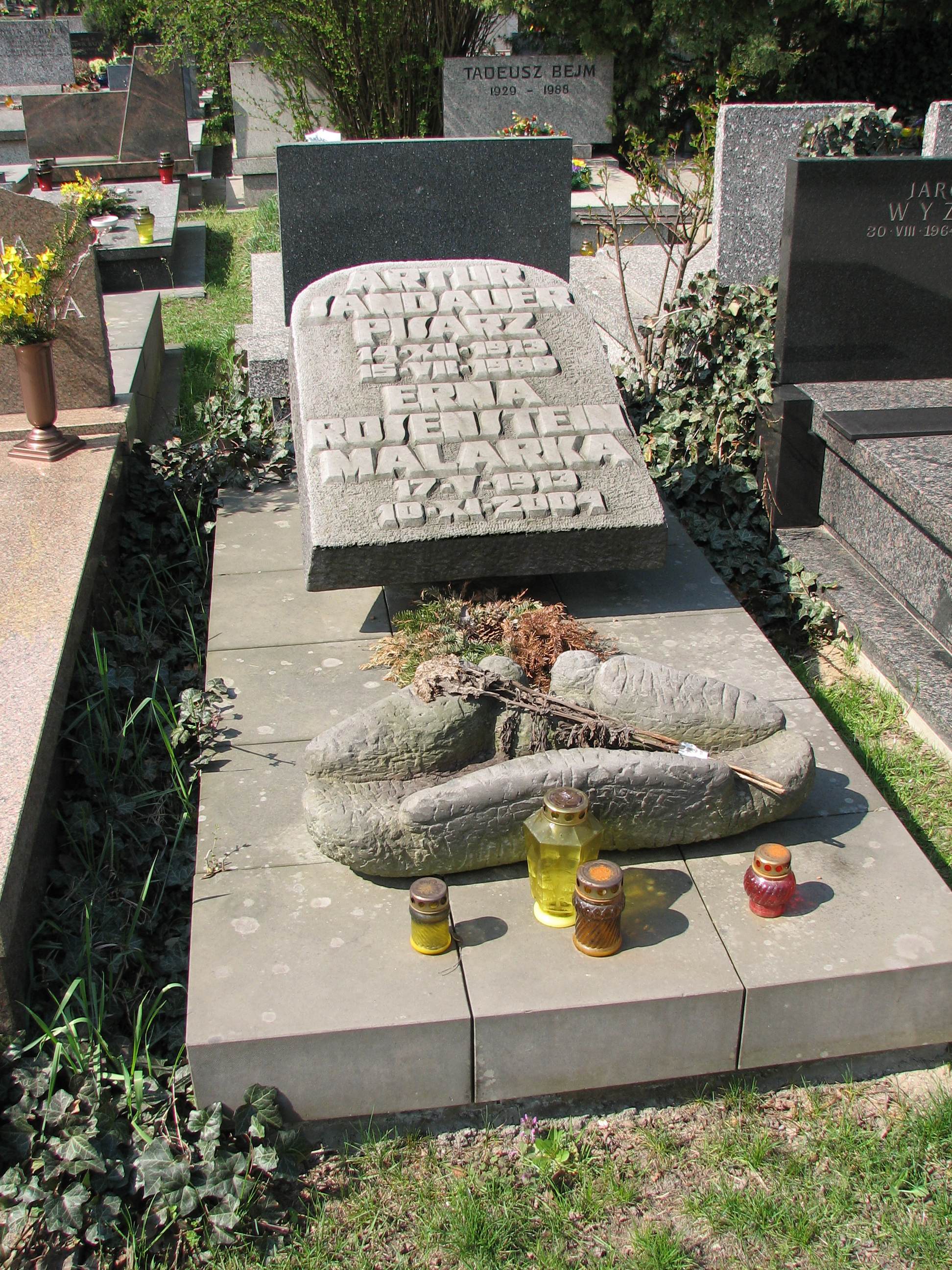 Artur Sandauer and Erna Rosenstein's monument, pomnik autorstwa Barbary Zbrożyny (Powązki Cemetery,Cmentarz Komunalny, d. Wojskowy)